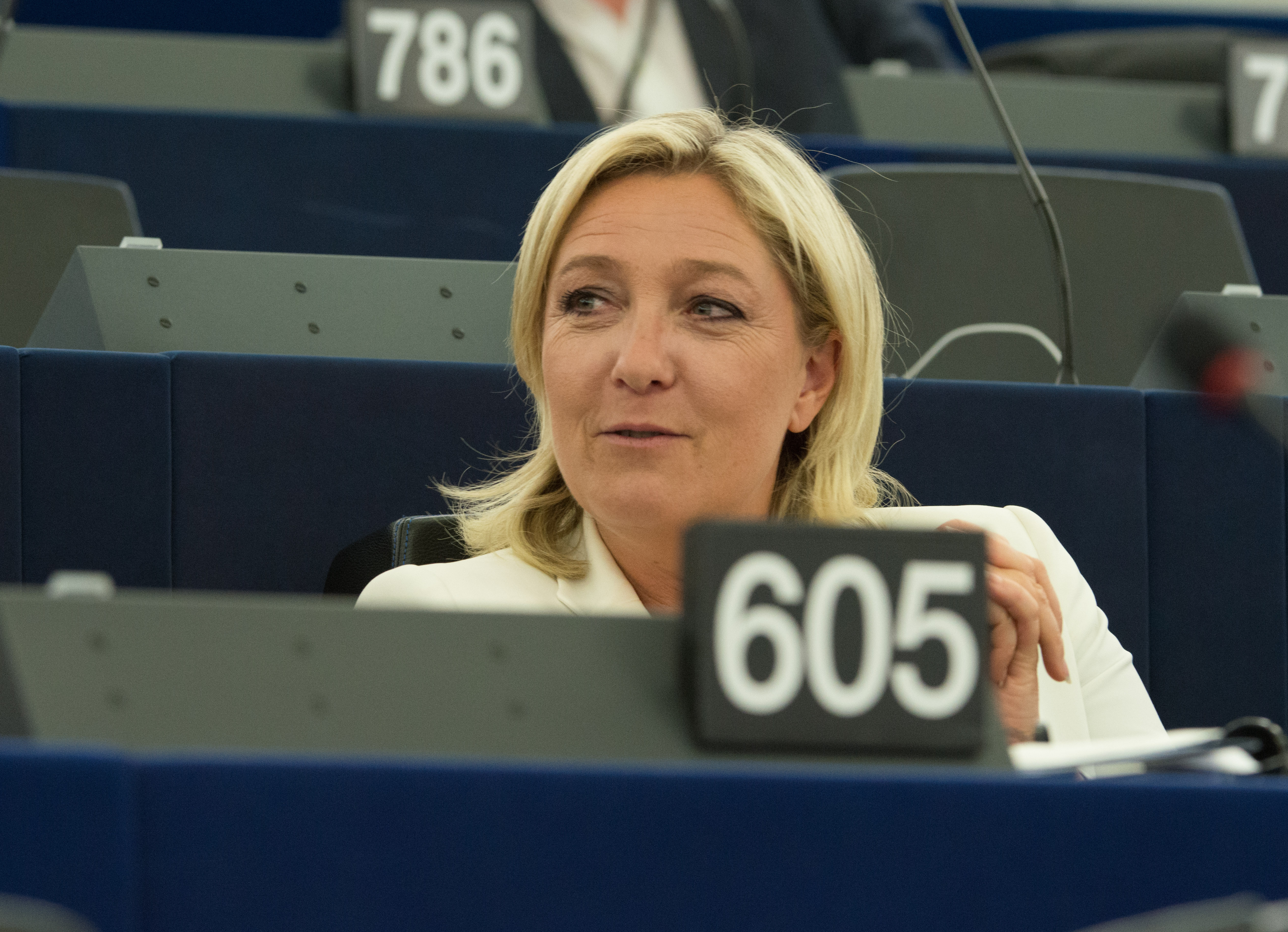 Marine Le Pen, MEP